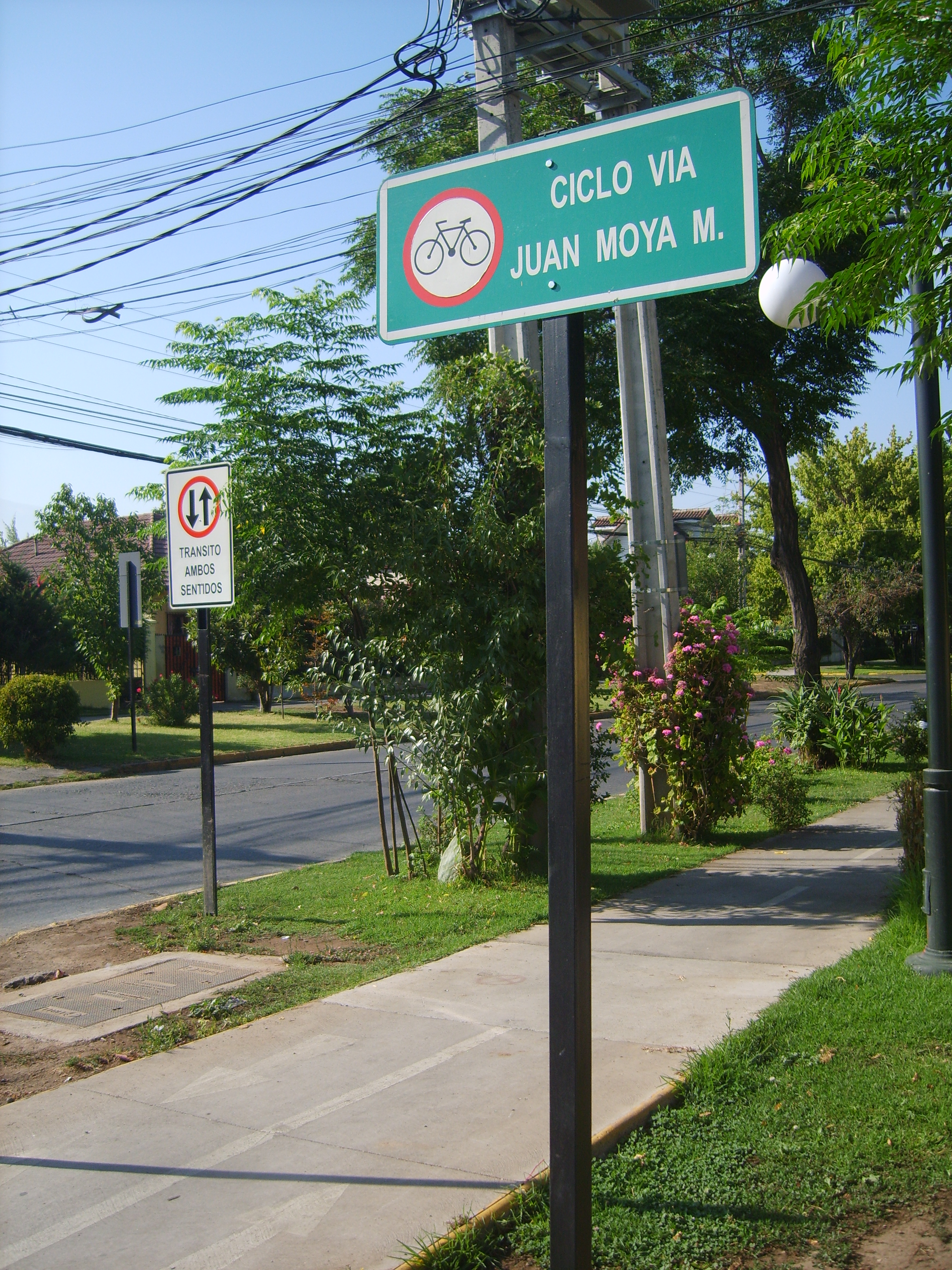 Ciclovía Juan Moya, Ñuñoa, Chile